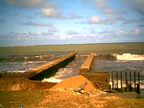 Cochino Beach pier